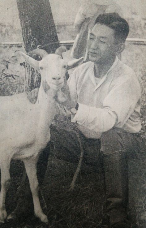 大久保亀治（大久保正陽の父）